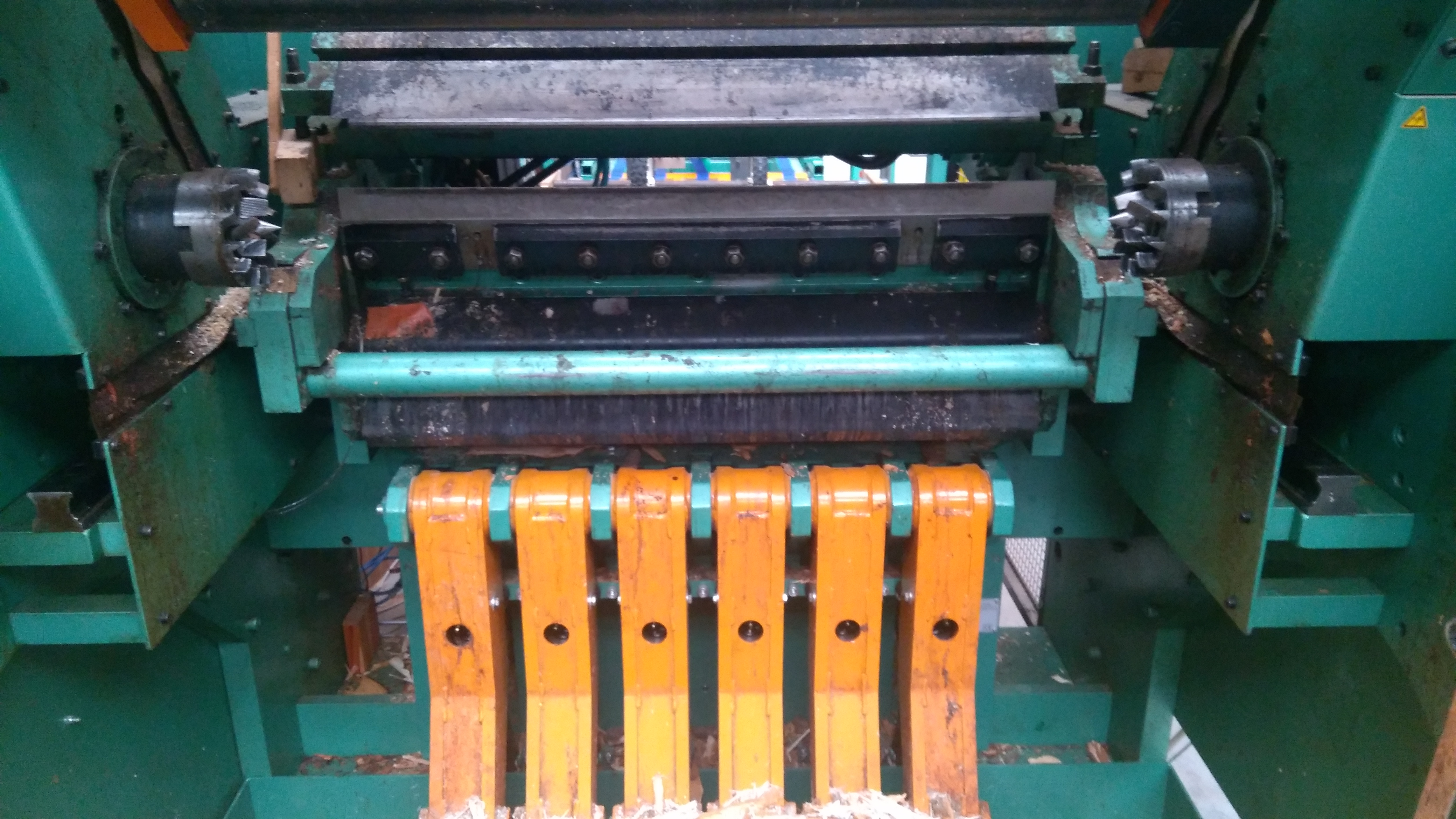 Le billon à dérouler est inséré dans les mors, les couteaux oranges servent à écorcer le billon sur place, le couteau est au milieu et la barre de pression est au dessus.